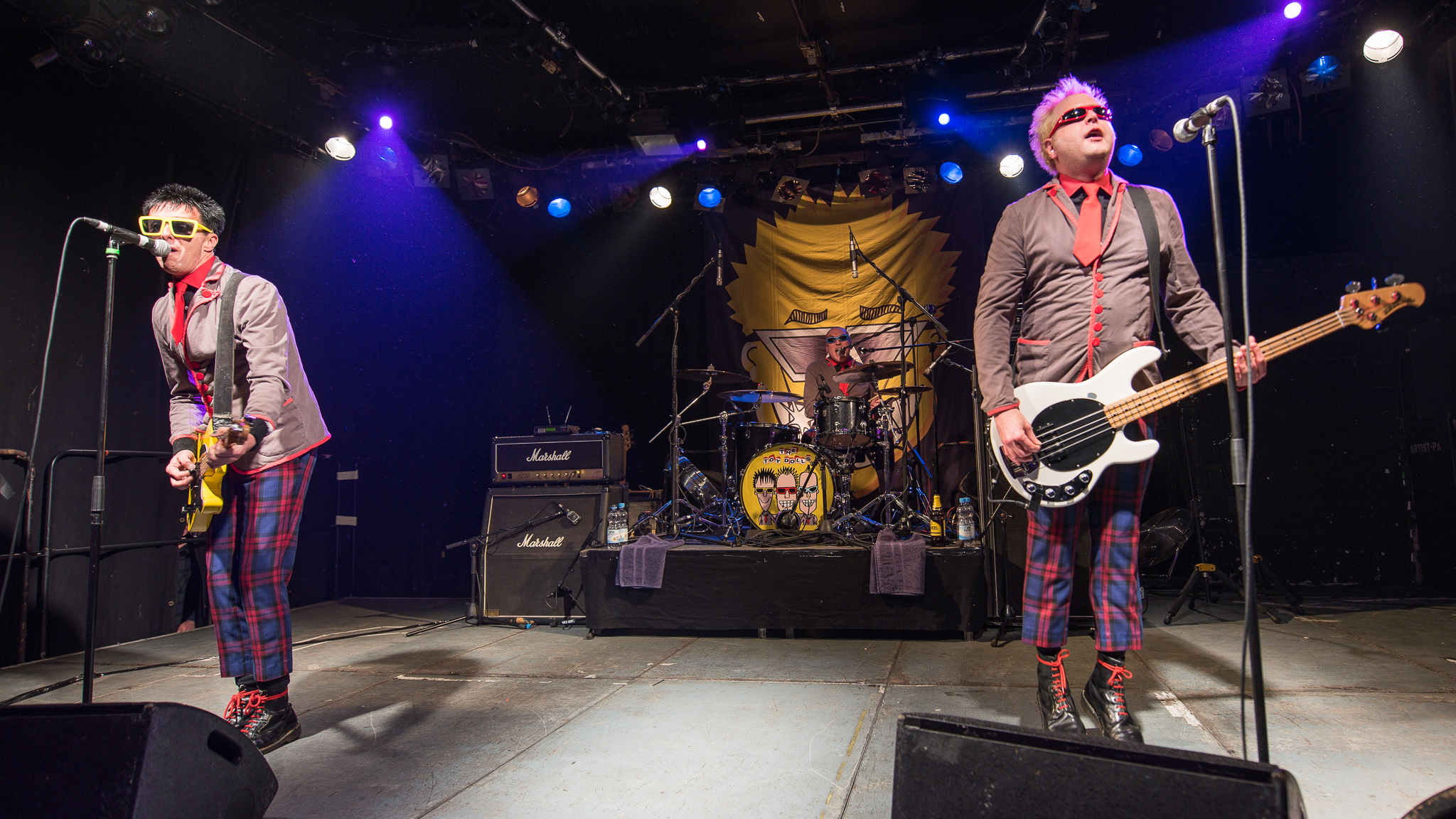 Concertbüro Franken,Der Hirsch,Duncan "The Amazing Mr. Duncan" Redmonds,Konzert,Livekonzert,Livemusik,Michael "Olga" Algar,Musik,Tom "Tommy Goober" Blyth,Toy Dolls